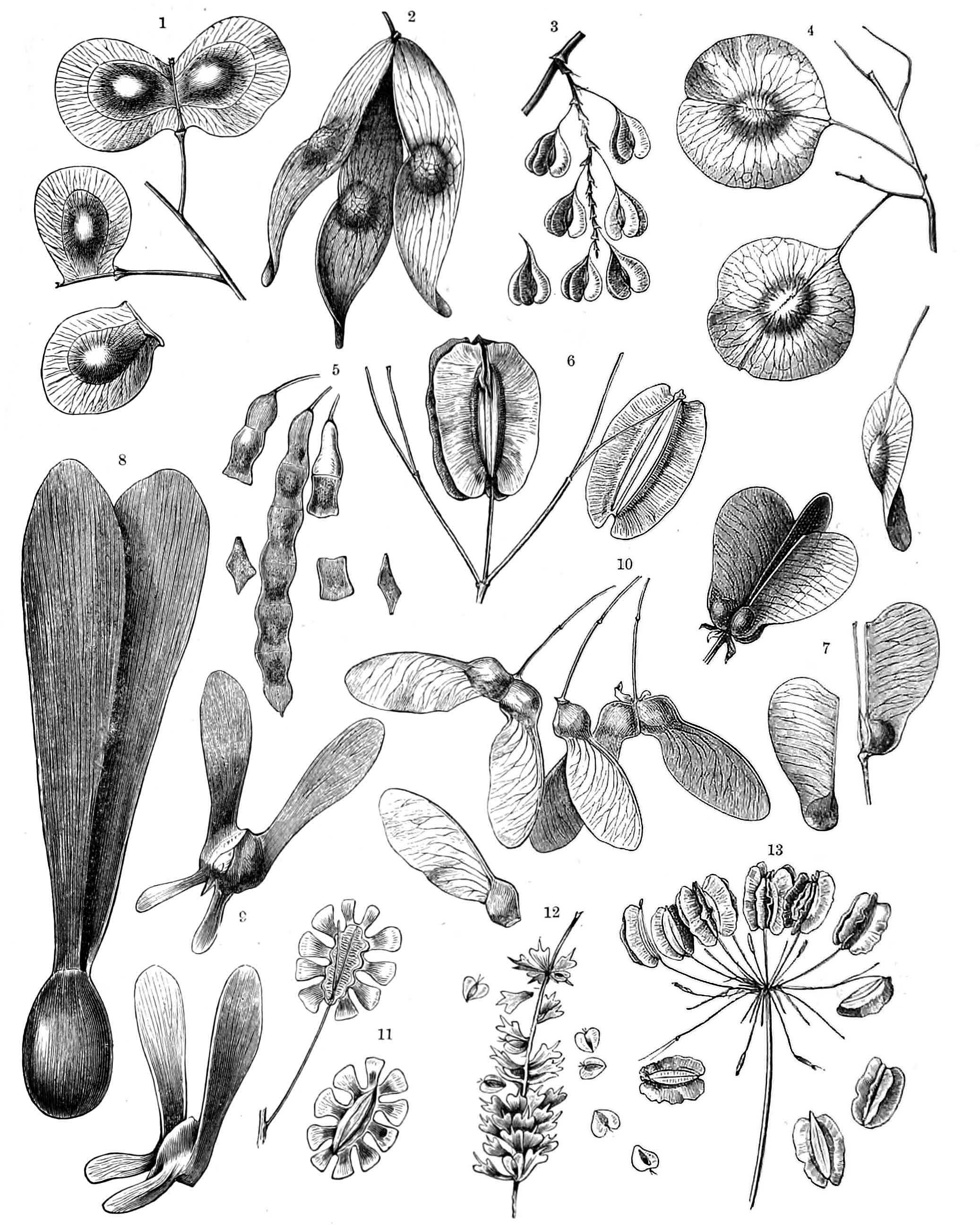 Семена растений, использующие эффект планирования для распространения: Megacarpaea laciniata Ailanthus glandulosa Polygonum Sieboldi Ptelea trifoliata AEschyomene glabrata Opoponax Cretica Banisteria Sinemariensis Gyrocarpus Asiaticus Triopteris bifurca Acer Monspessulanum Artedia squamata Betula verrucosa Laserpitium latifolium